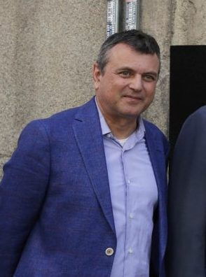 Cuando se cumplen 150 años del nacimiento de María Guerrero en Madrid, el Ayuntamiento de la capital le rinde homenaje con la colocación de una placa conmemorativa en el teatro que lleva su nombre. La alcaldesa de la ciudad, Manuela Carmena, acompañada por el secretario de Estado de Cultura, Fernando Benzo, y el director del Centro Dramático Nacional, Ernesto Caballero, ha asistido hoy al descubrimiento de esta placa del Plan Memoria de Madrid, en la que se ha inscrito el siguiente texto: “Aquí vivió y murió María Guerrero (1867-1928) gran actriz, empresaria e impulsora del teatro español”.